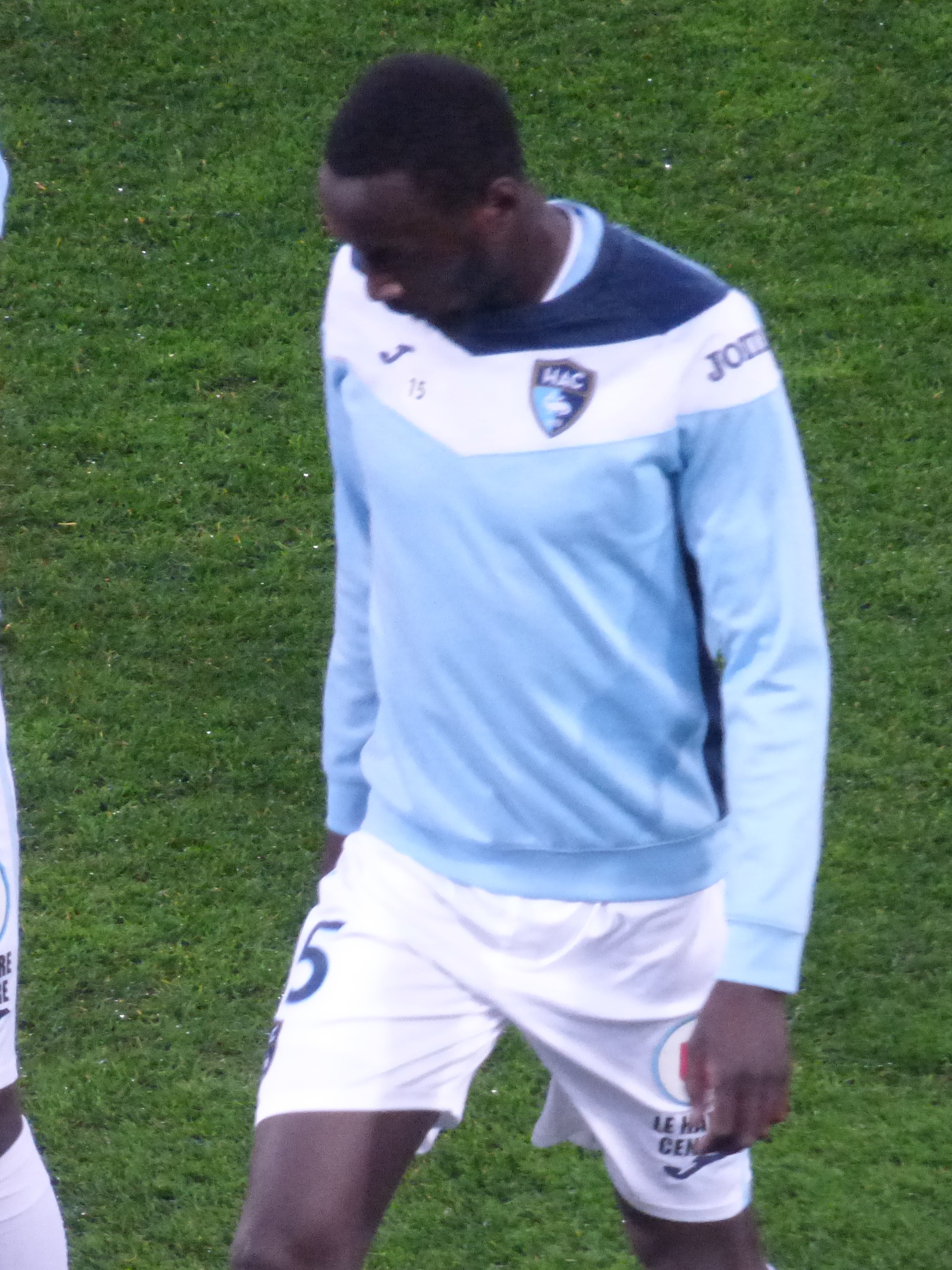 Samba Camara avant le match Lens / Le Havre, comptant pour la 30ème journée du championnat de France de Ligue 2 2018-2019, le 1er avril 2019 au Stade Bollaert-Delelis.